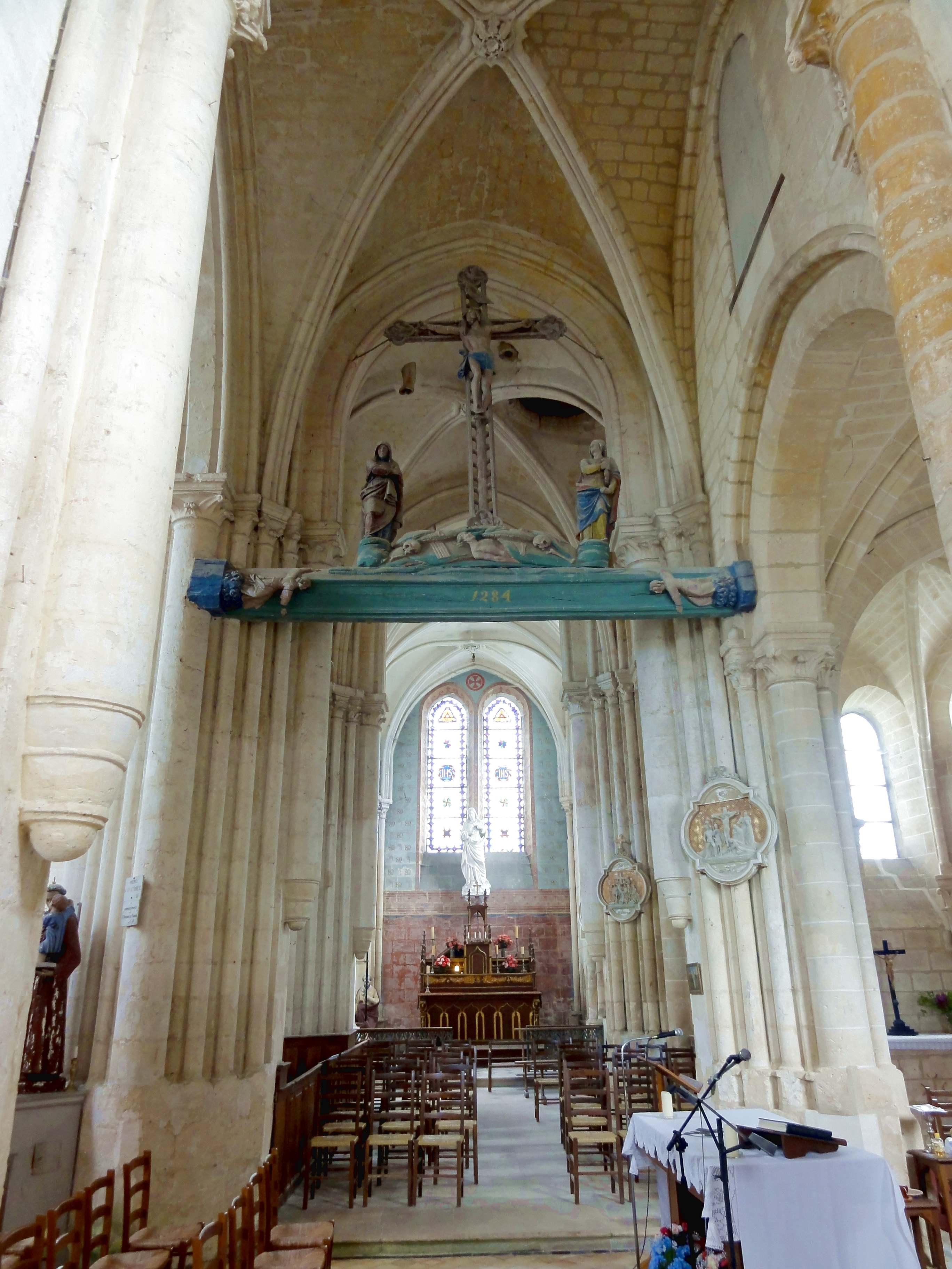 Intérieur de l'église - voir titre.